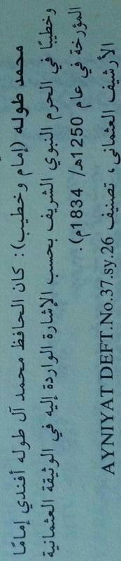 صورة من تصنيف الوثيقة